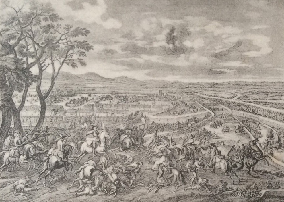 Battaglia di Luzzara (1702),, da una cartolina commemorativa del Reggimento "Piemonte Cavalleria"